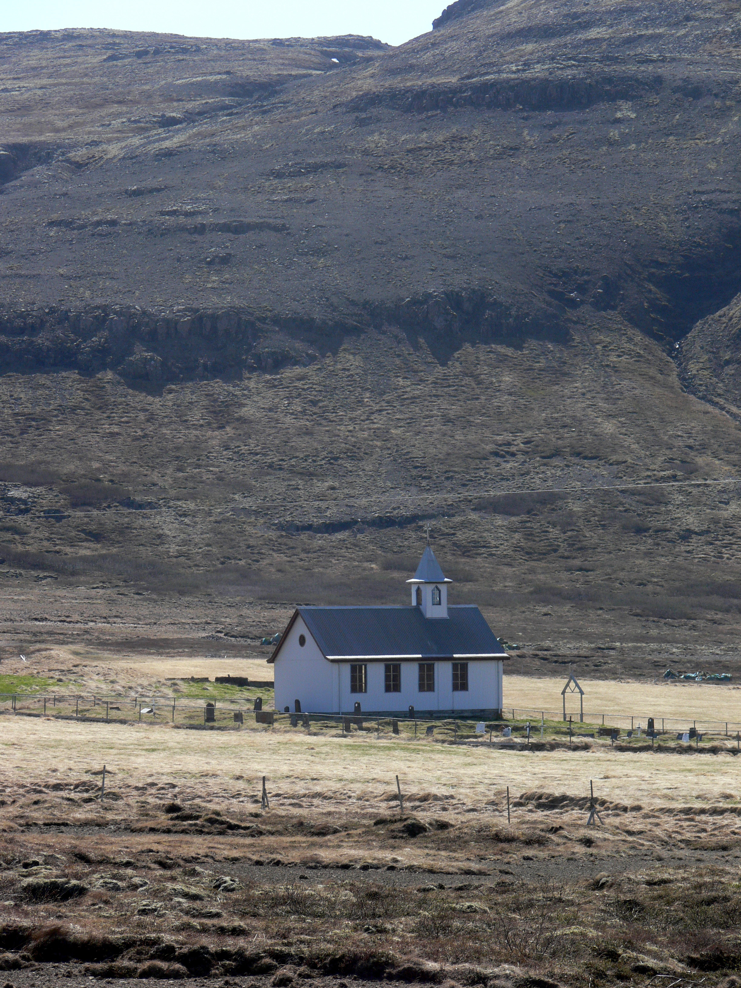 Die Kirche Breiðabólstaður an der Nordküste von Snæfellsnes.